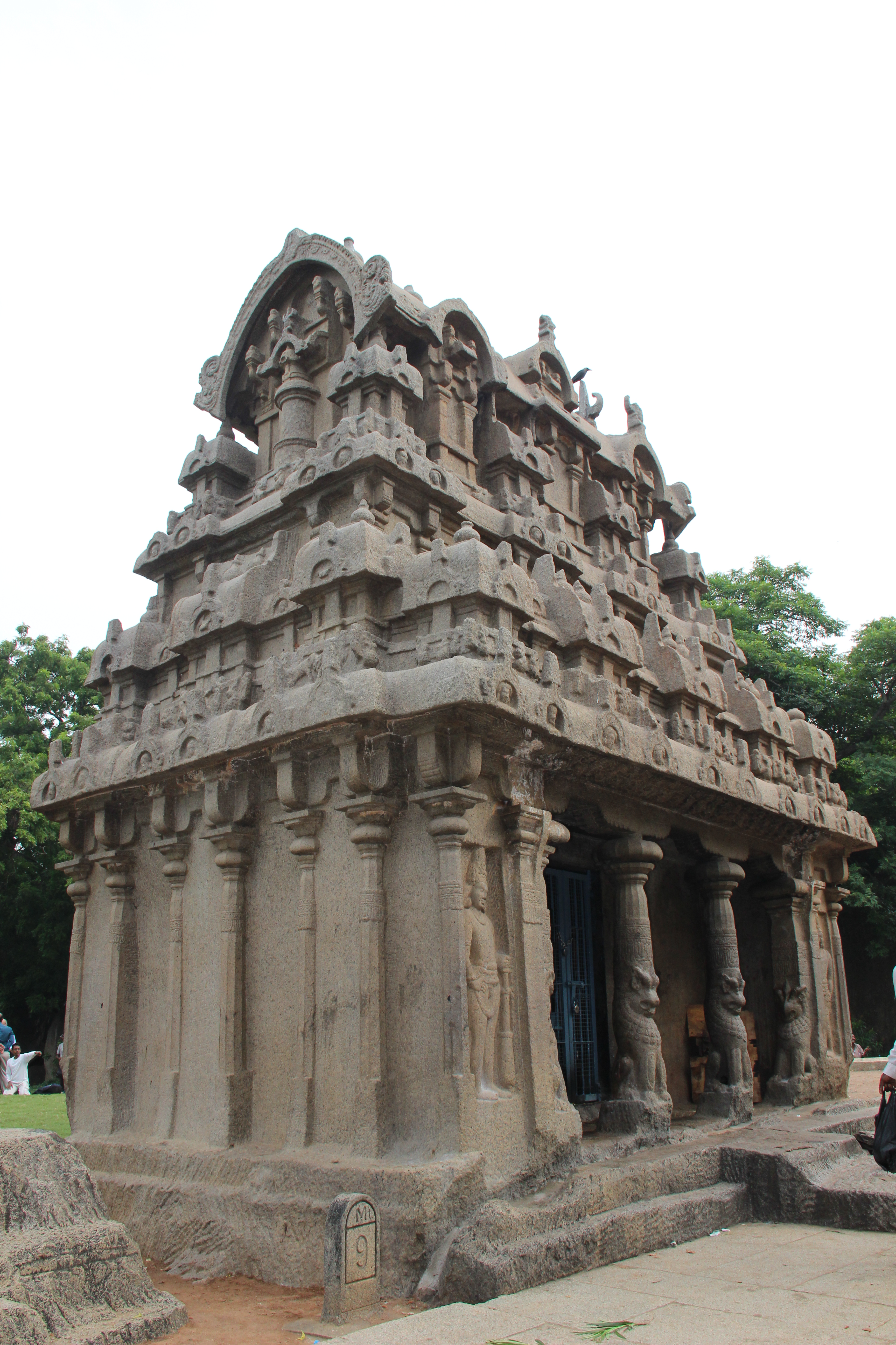 மாமல்லபுரத்திலுள்ள எழிலார்ந்த பிள்ளையார் கற் கோயில்.